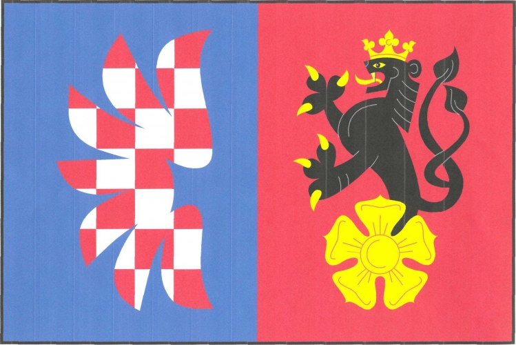 vlajka, Janoušov, okres Šumperk